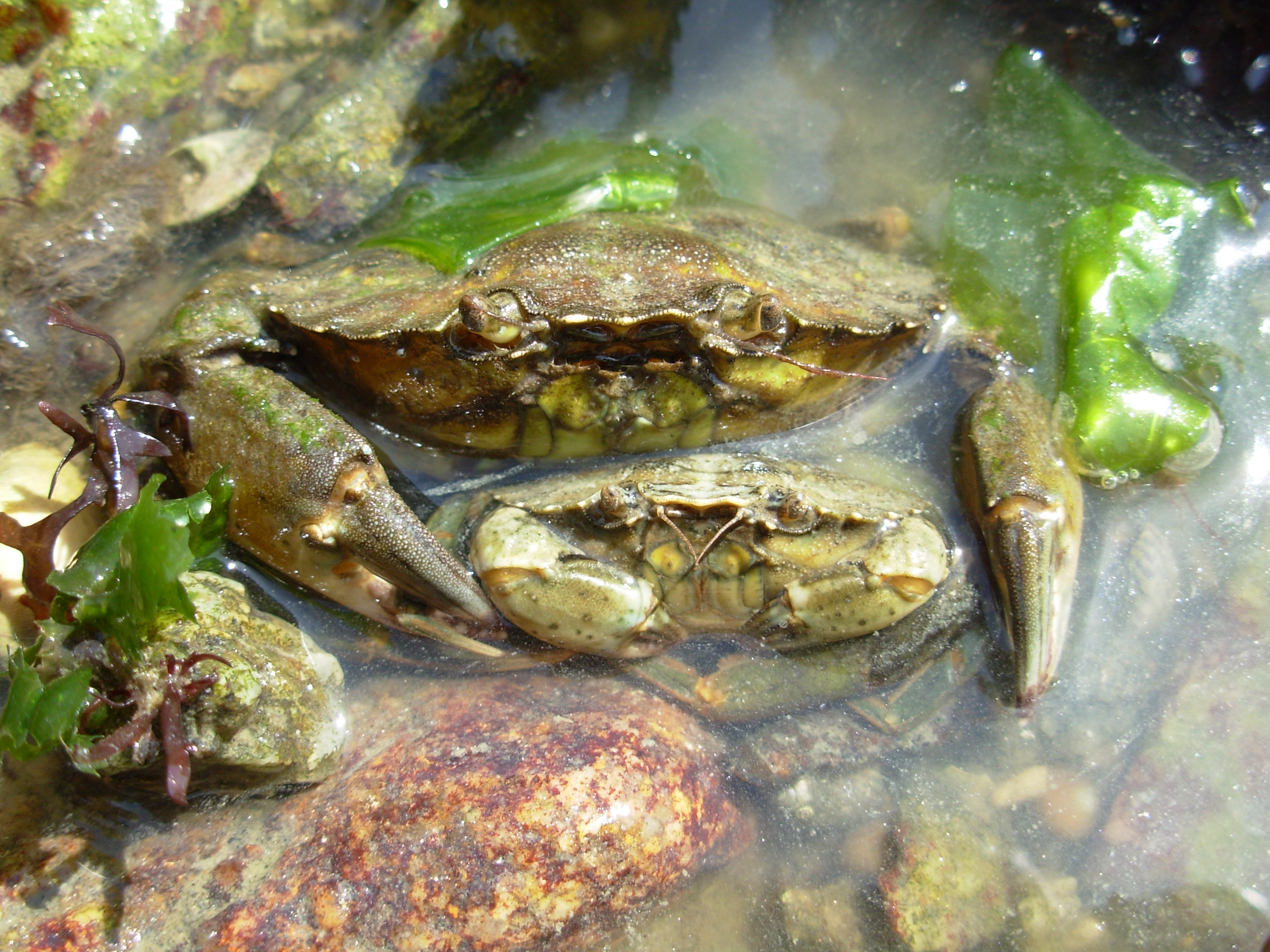 Le crabe mâle chevauche la femelle dont la face dorsale est appliquée contre la face ventrale du mâle.